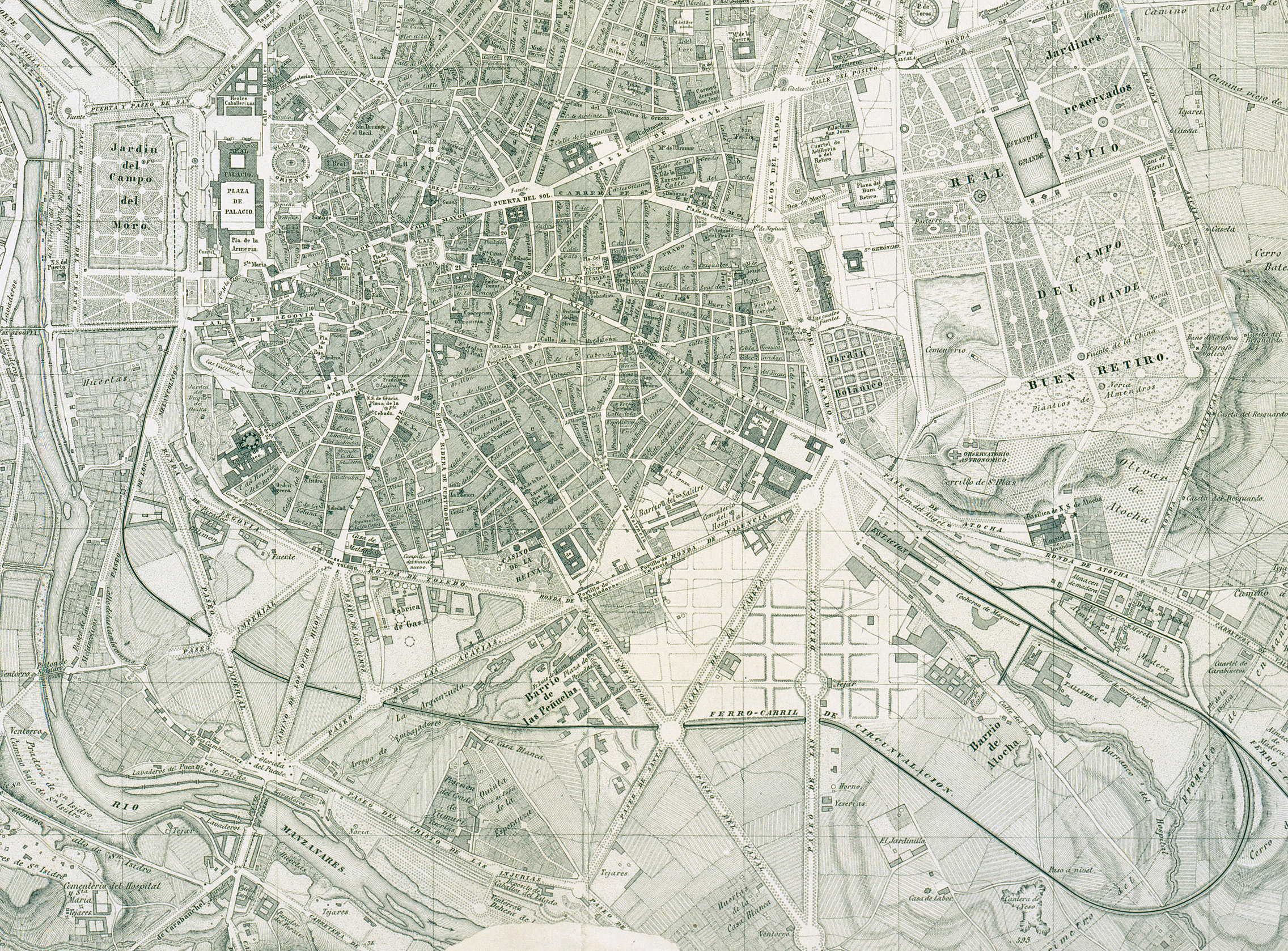 Plano de Madrid ... levantado a expensas del Excmo. Ayuntamiento desde 1841 a 1846 por los ingenieros de caminos D. Juan Merlo, D. Fernando Gutierrez y D. Juan Ribera ... ; la rectificación interior, el aumento exterior y el dibujo, han sido hechos por D. José Pilar Morales ; Pedro Peñas grabó